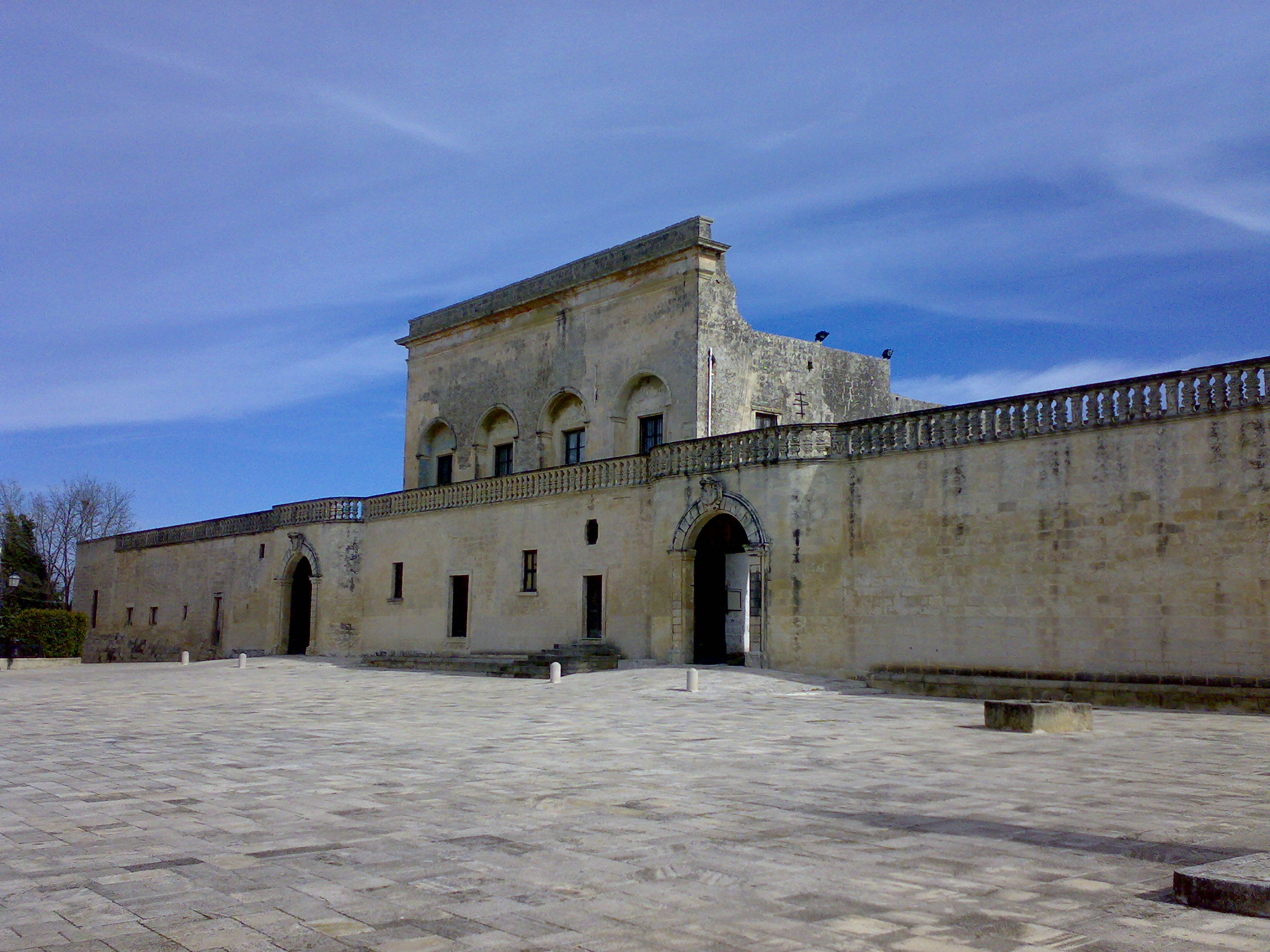 Palazzo Marchesale di Botrugno, provincia di Lecce